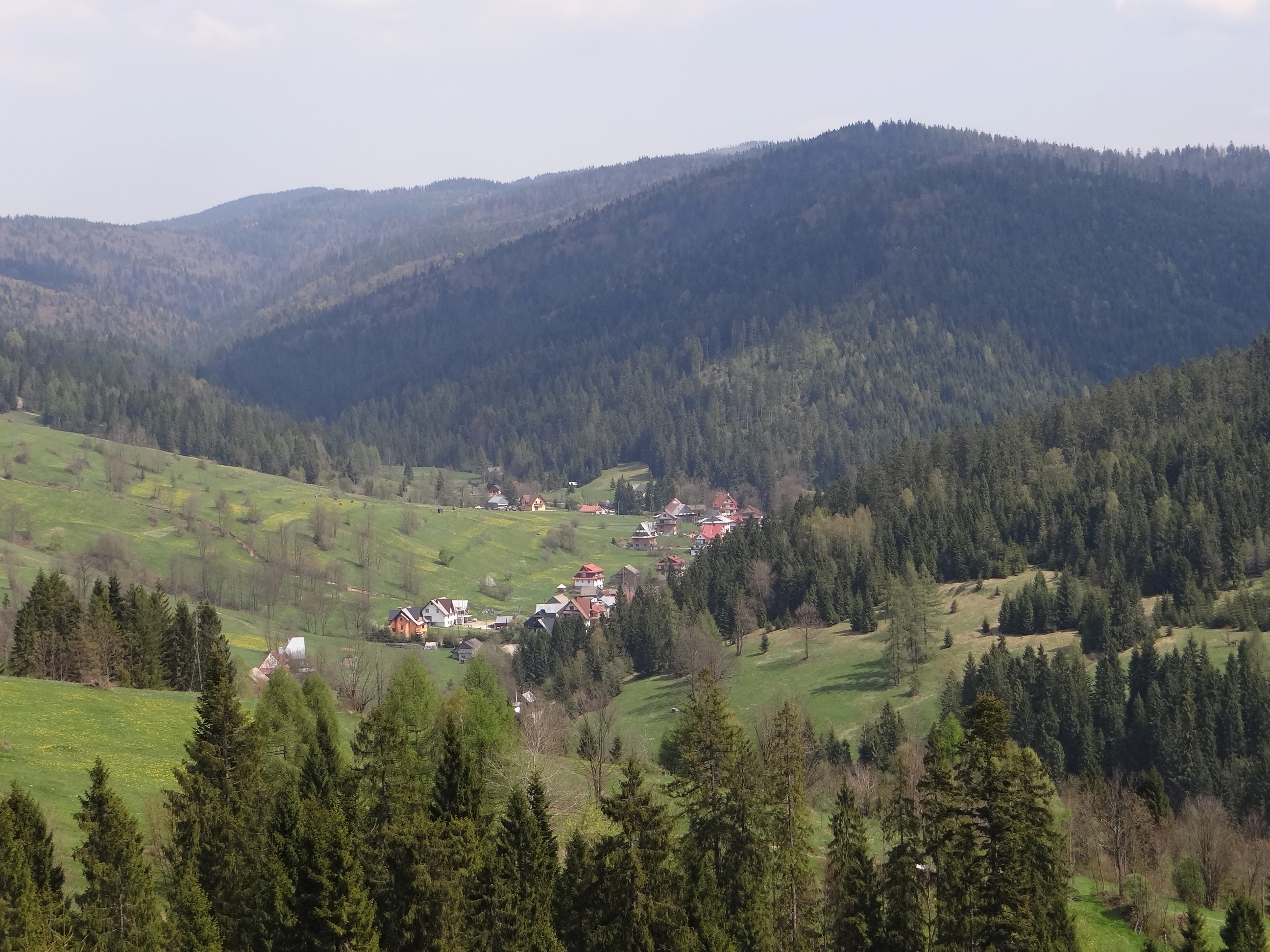 Obidowa